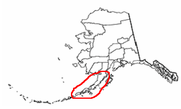 Півострів Аляска на карті штату Аляска